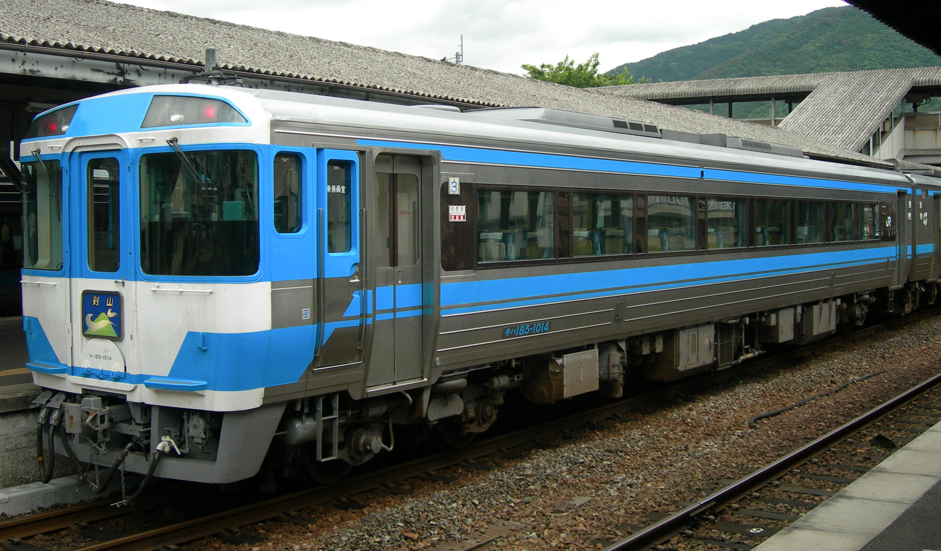 キハ185-1014